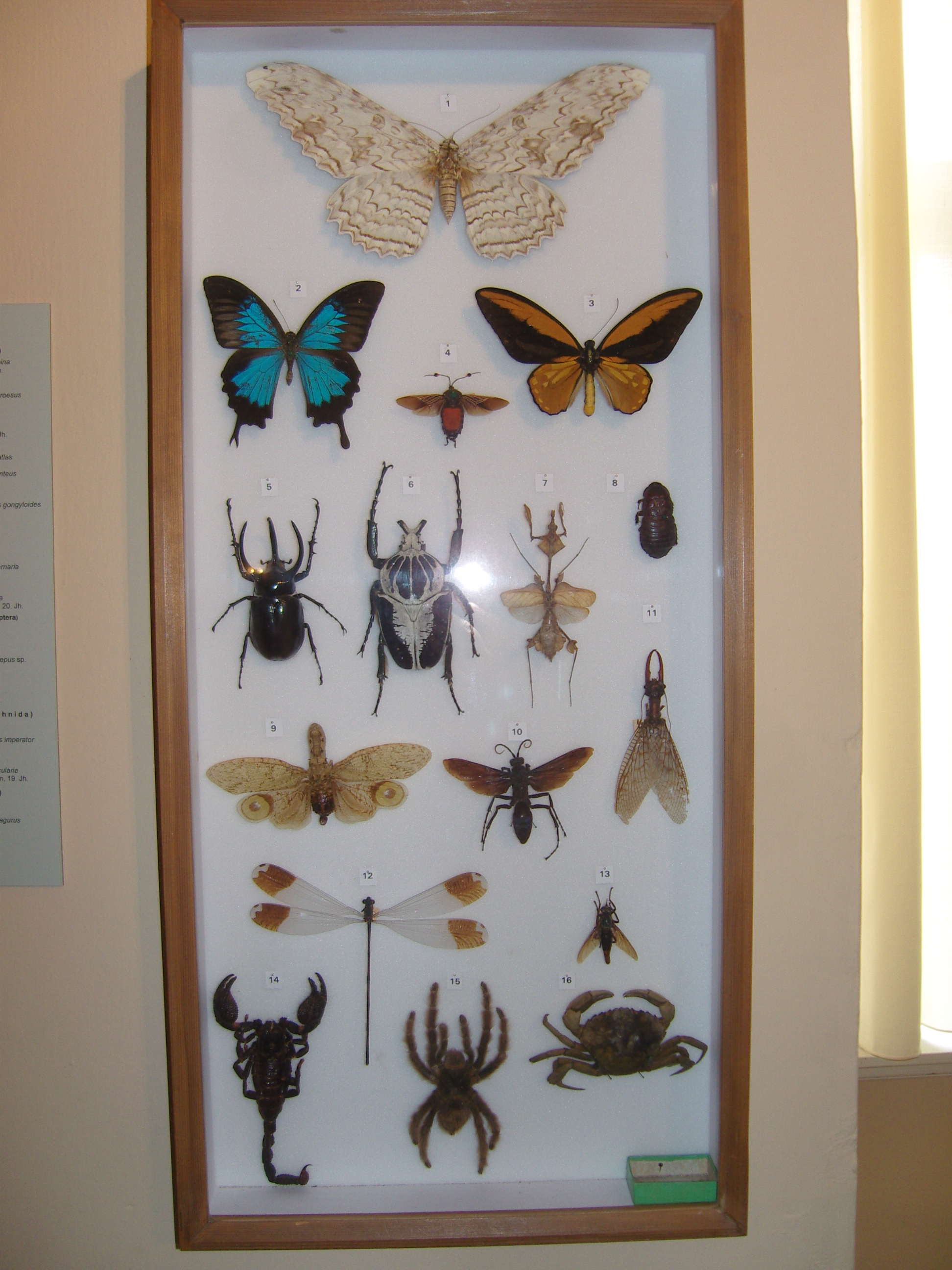 Ausstellungsstücke im Naturhistorischen Museum in Rudolstadt auf Schloss Heidecksburg